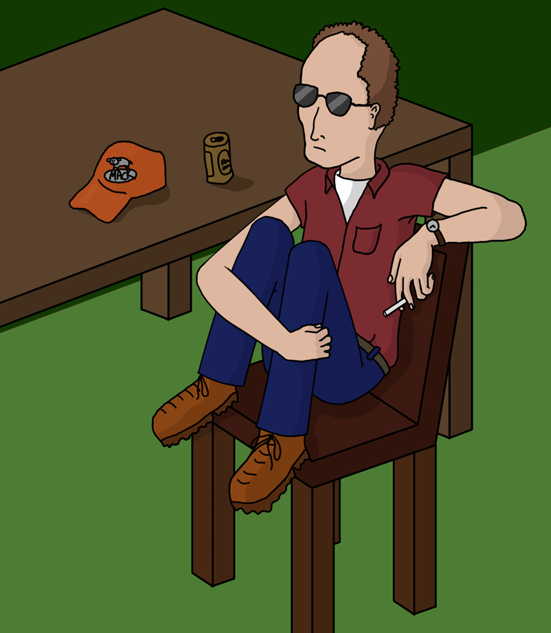 dale grible